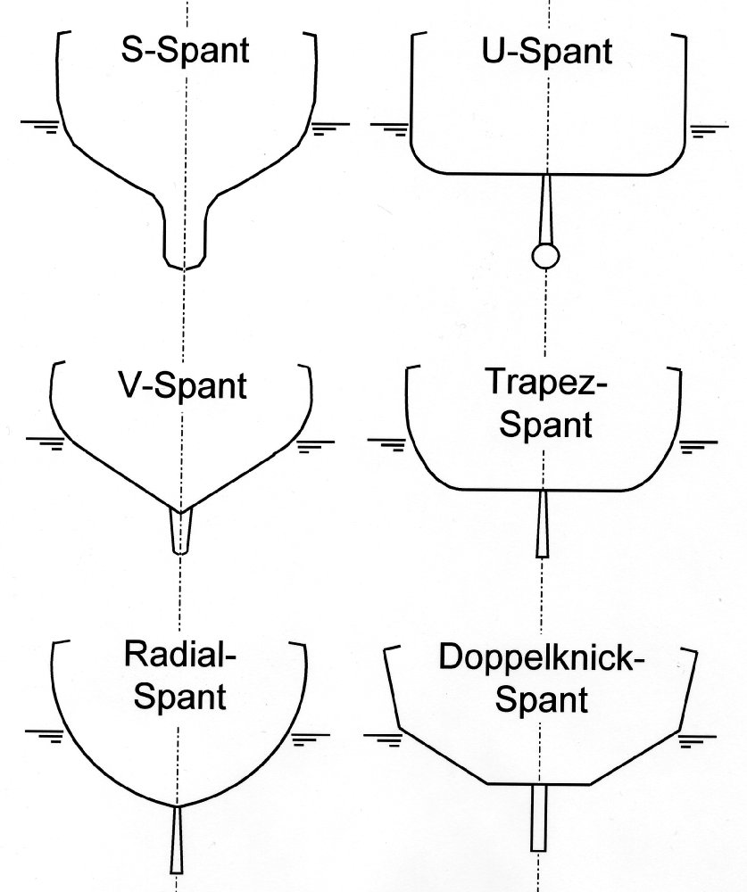 Spantformen (große Schrift)